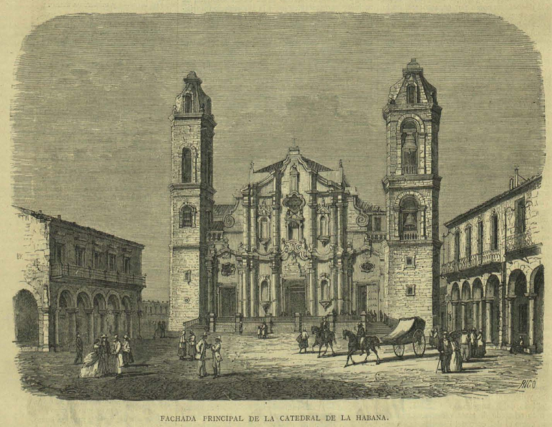 Fachada principal de la catedral de la Habana, grabado publicado en la revista española La Ilustración Católica.